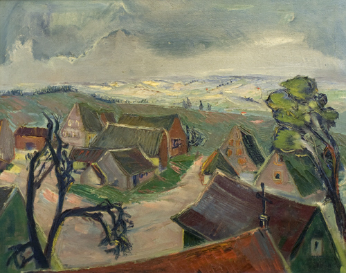 Hochemmingen, 1930; Franziskanermuseum Villingen